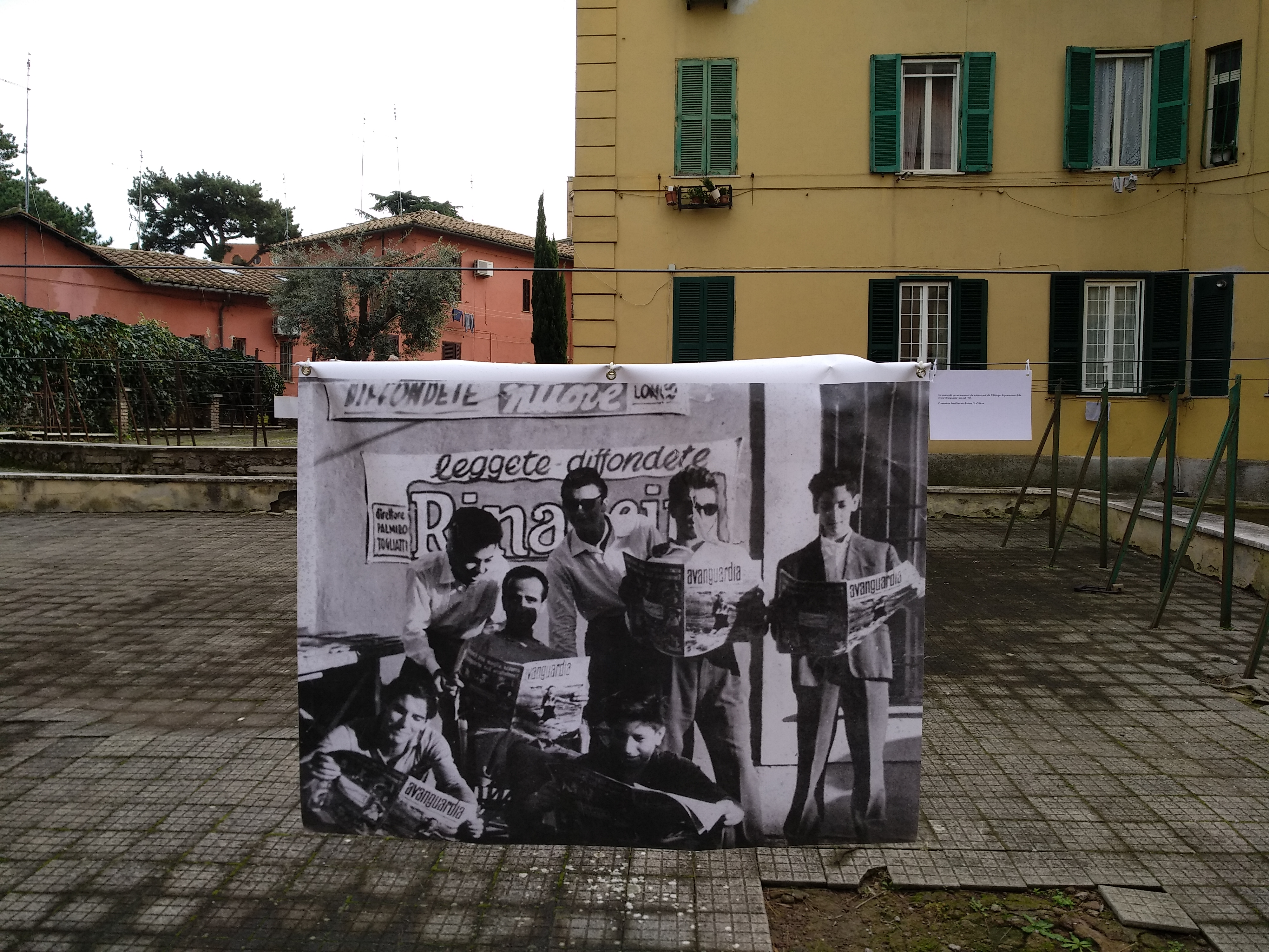 Visure Acatastali in visita alla Garbatella nel dicembre 2018